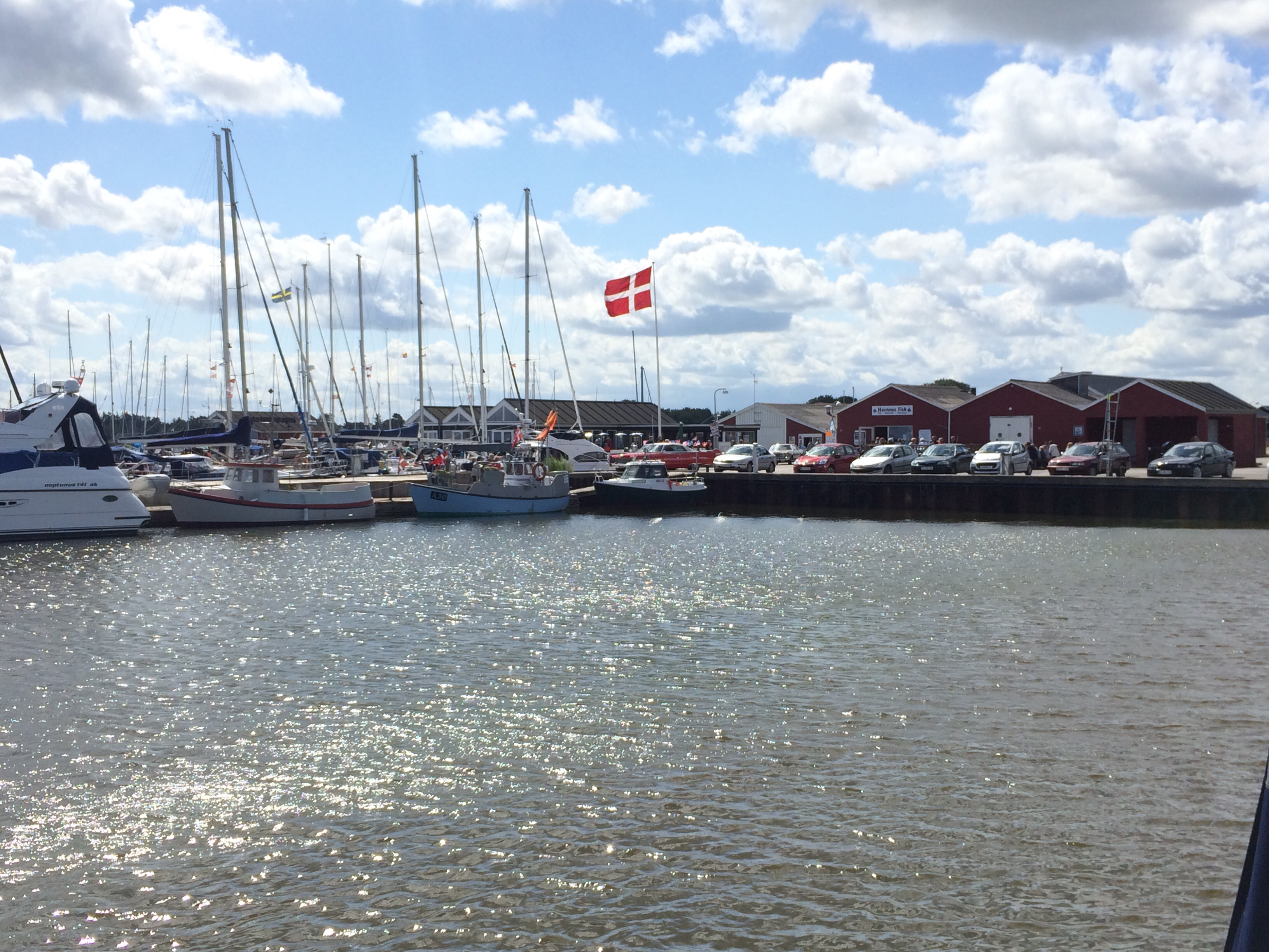 Øster Hurup Havn